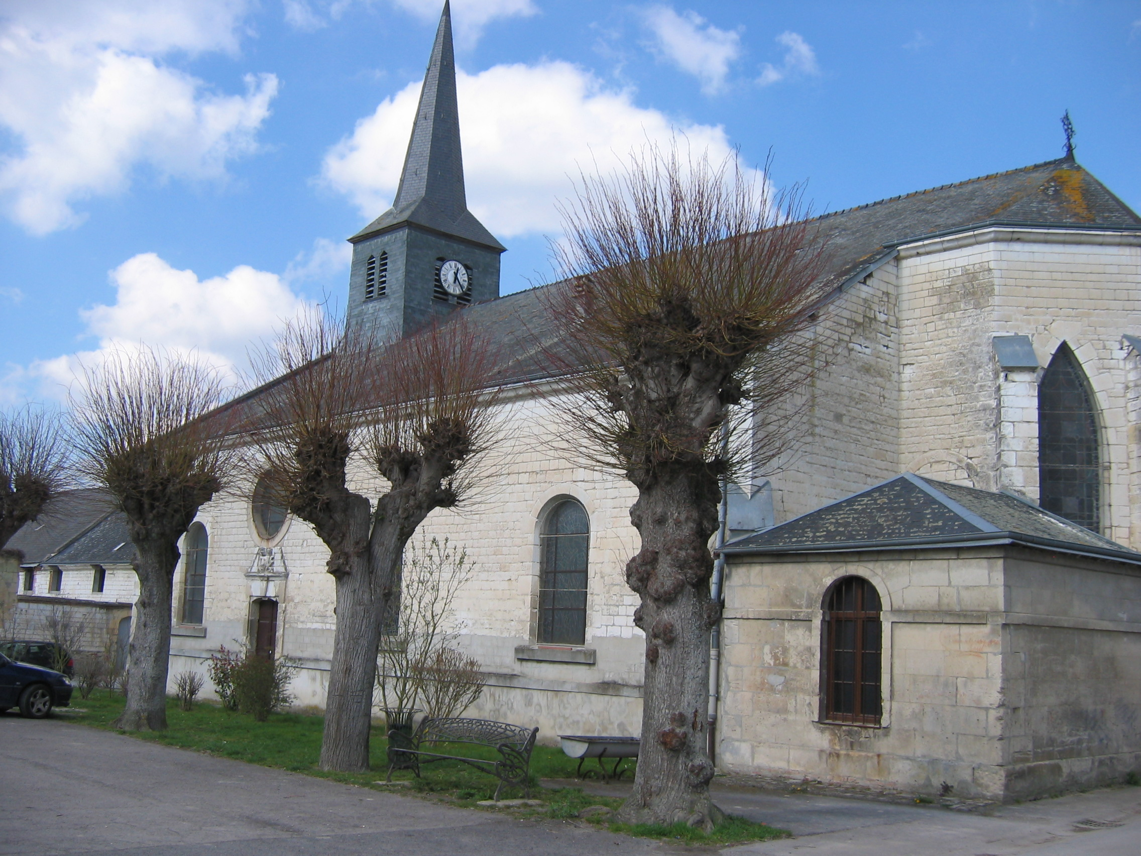 avril 2015 Vue sur l'église, Avaux, Ardennes, france